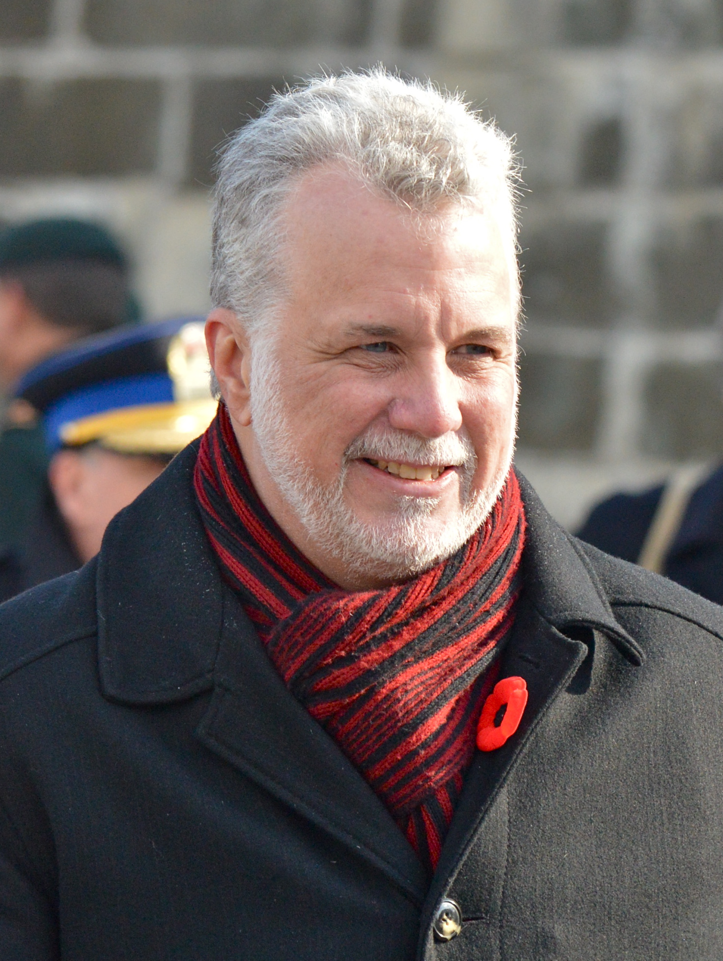 Philippe Couillard, à Québec, lors de la cérémonie du Jour du souvenir 2014